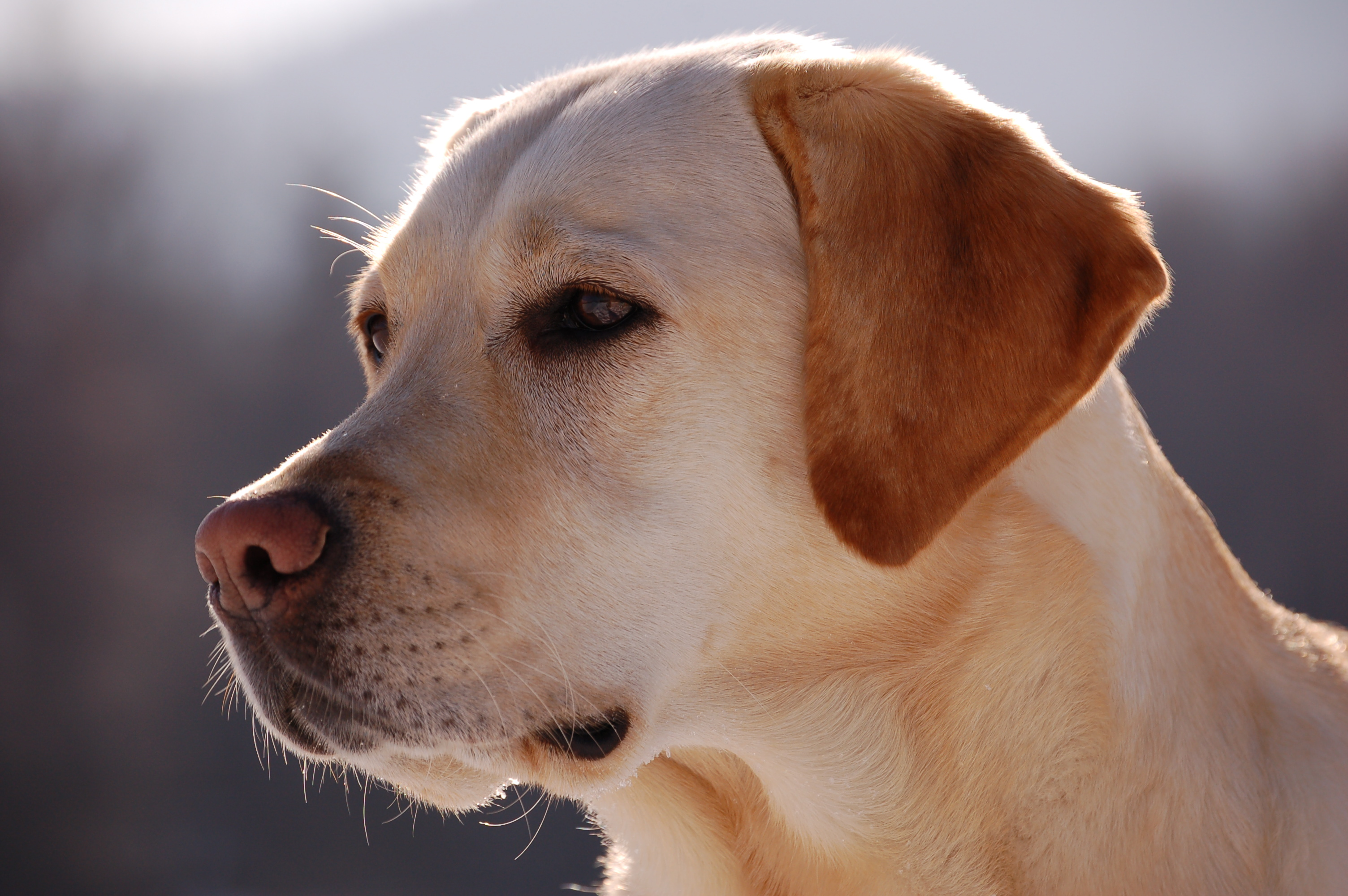 Description: Labrador Retriever, f., Blue Dun von Straßburg - Kärnten (Afra)